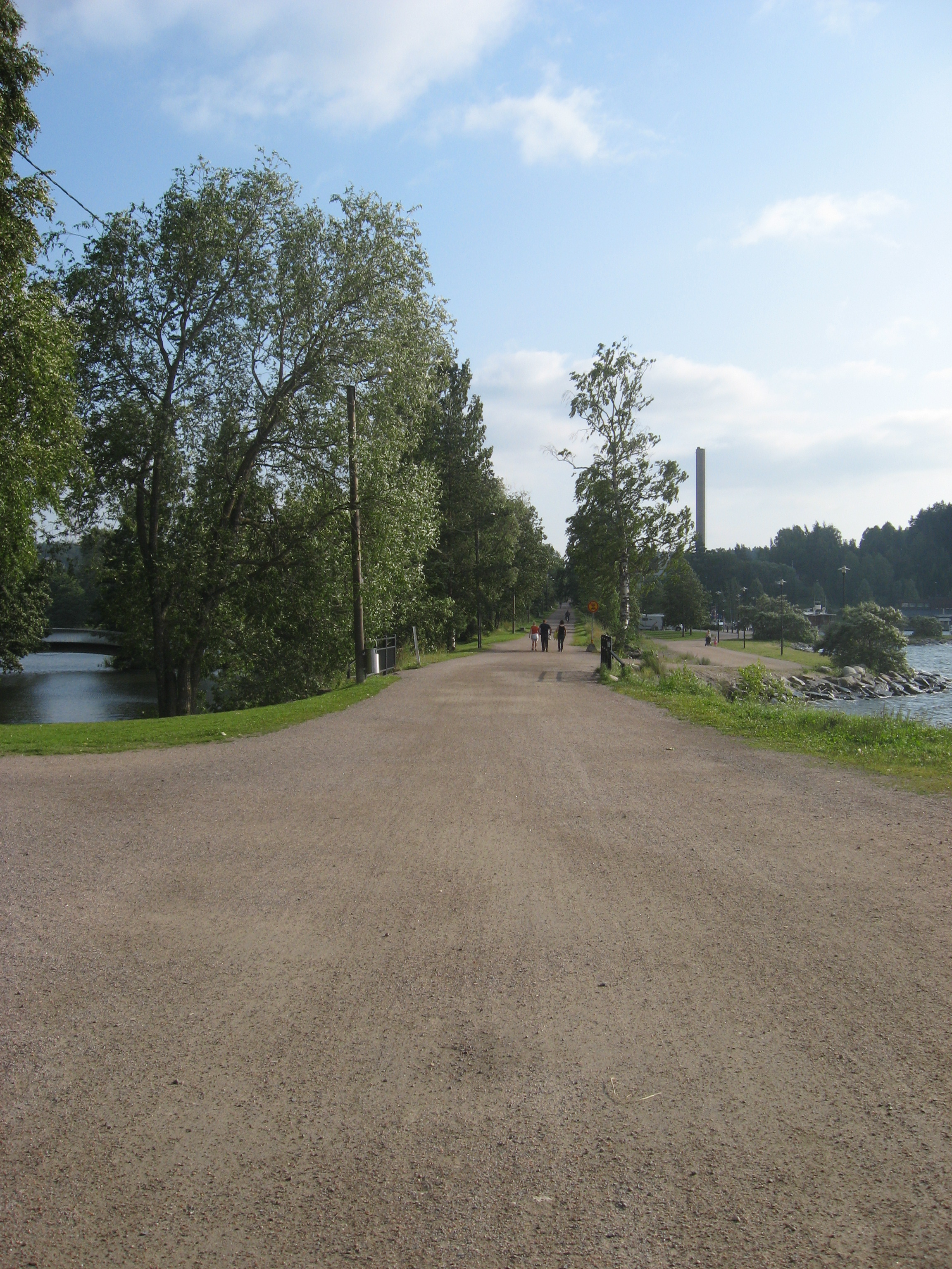 Vesijärven ja Pikku-Vesijärven jakava tie